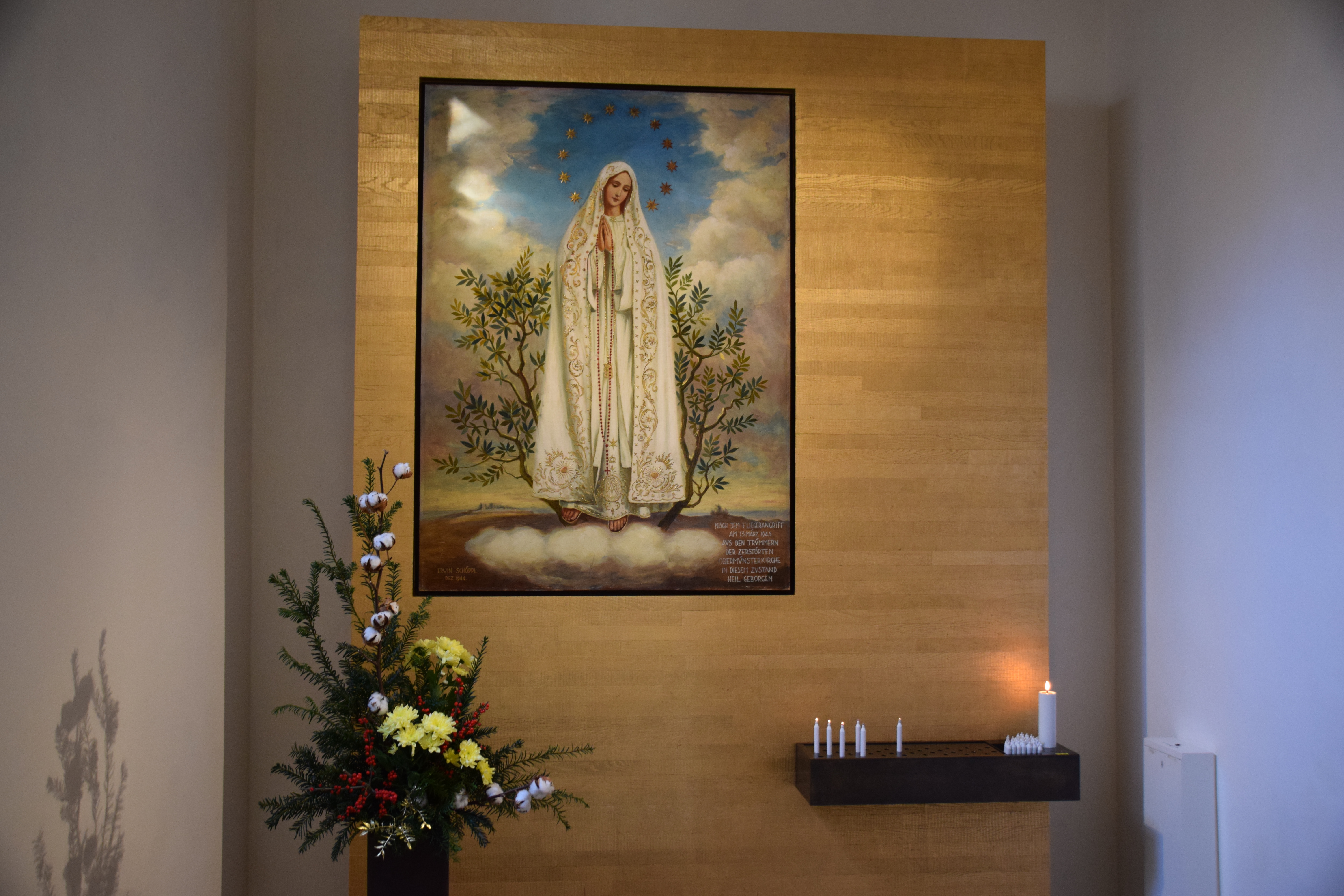 Andachtsraum der Stiftspfarrkirche St. Kassian in Regensburg